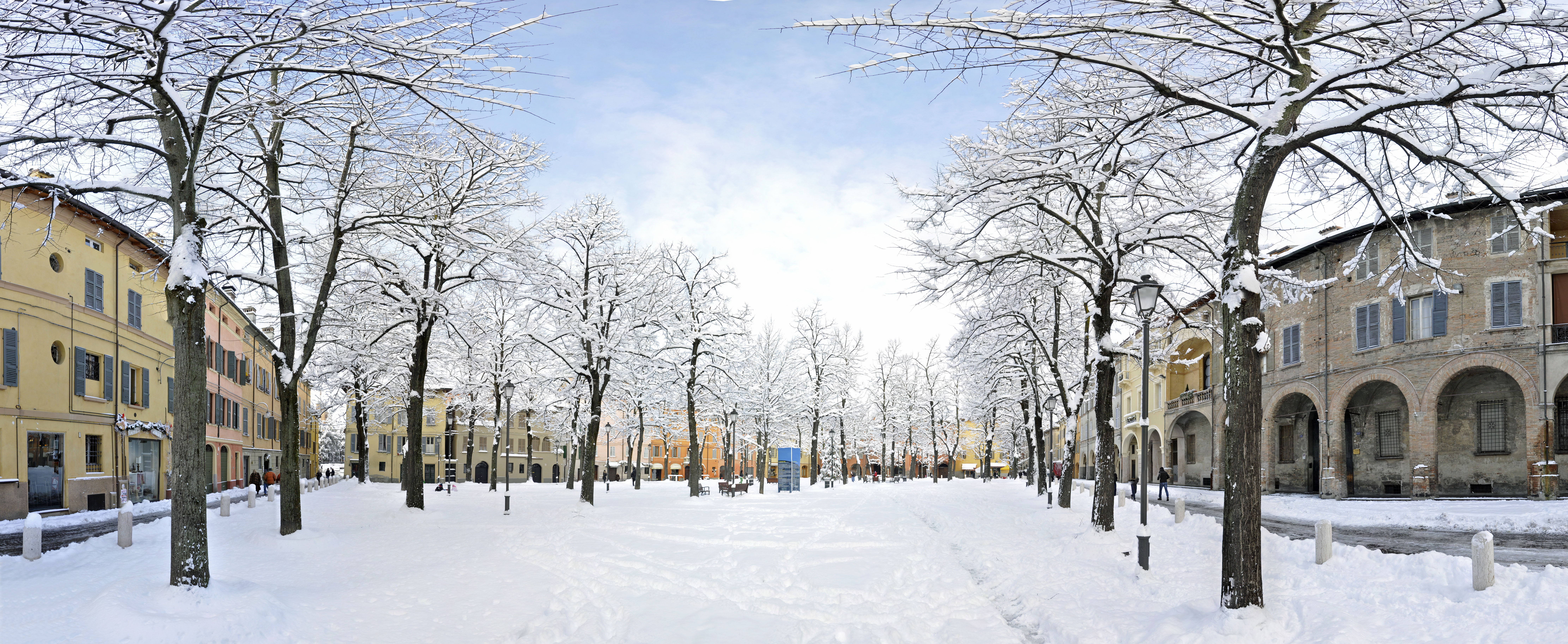 Piazza Fontanesi - Reggio Emilia, Italia